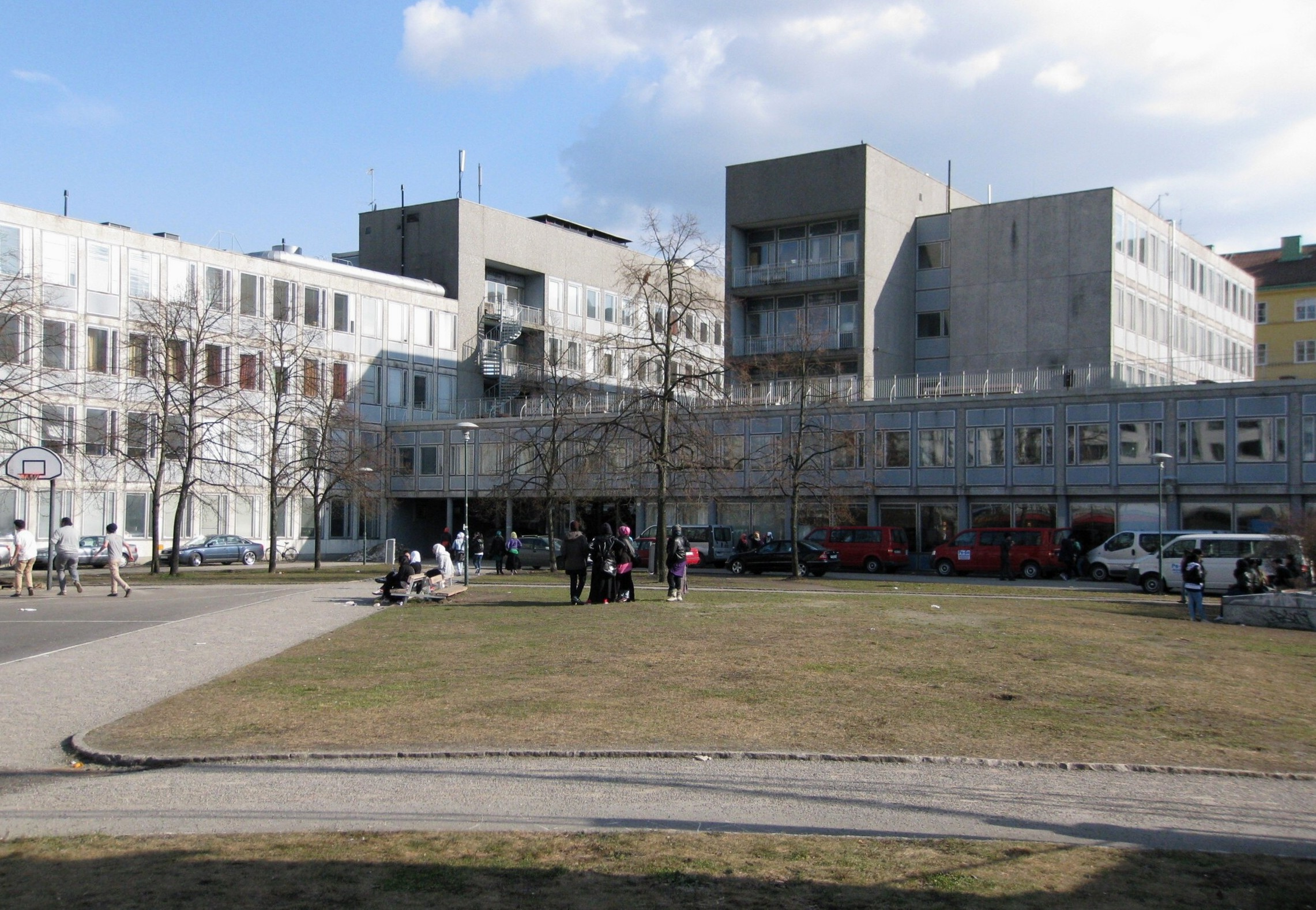 Åsö torg, Södermalm, Stockholm.